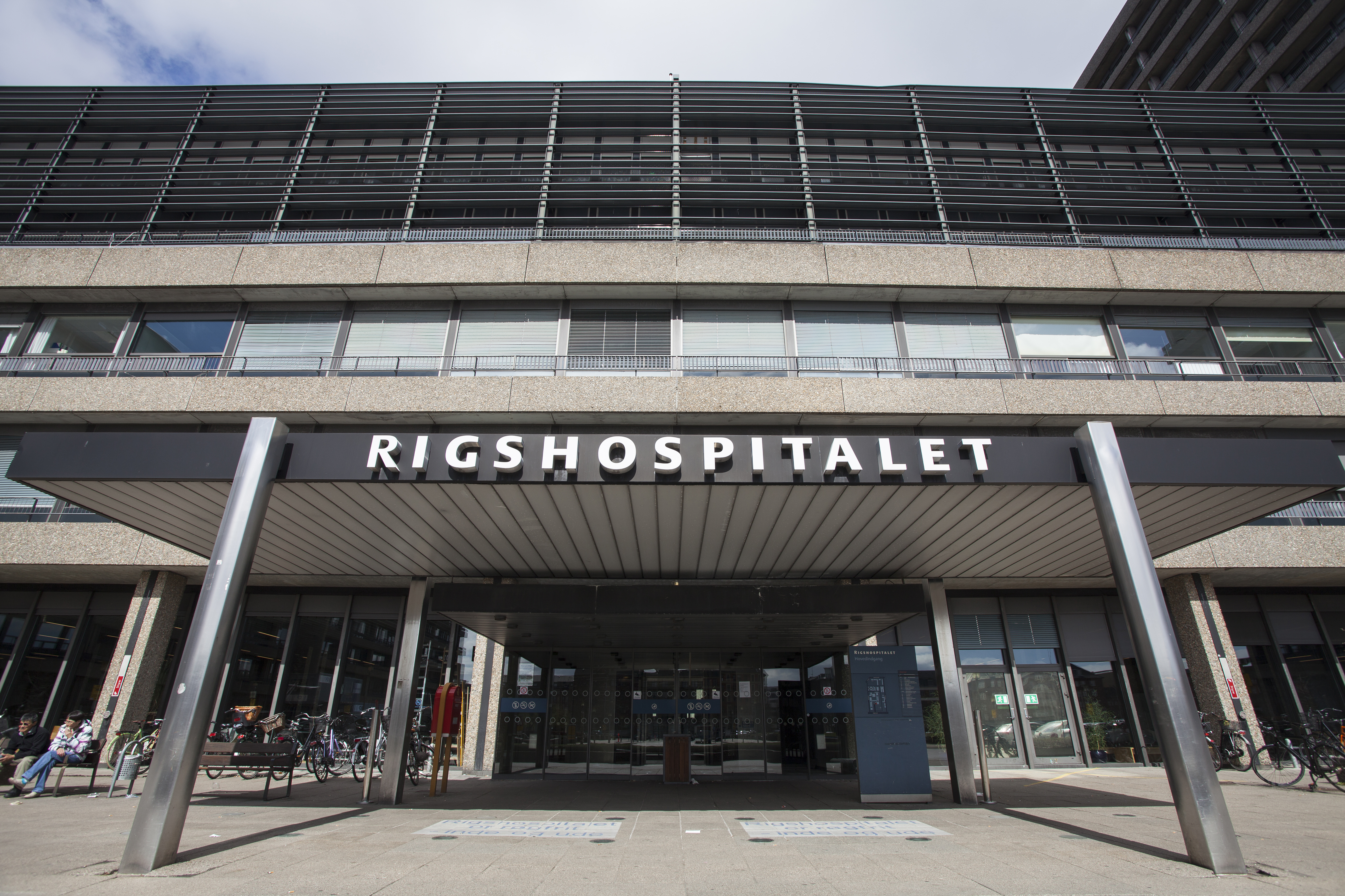 Rigshospitalet København, Danmarks största sjukhus, hospital in Denmark Foto: News Øresund - Johan Wessman. © News Øresund. Bilden får fritt publiceras under förutsättning att källa anges (Foto: News Øresund + fotografnamn). The picture can be used freely under the prerequisite that the source is given (Photo: News Øresund + the name of the photografer. Originalfil tillhandahålles gratis, kontakta: News Øresund, Malmö, Sweden. News Øresund är en oberoende regional nyhetsbyrå som ingår i projektet Øresund Media Platform som drivs av Øresundsinstituttet i partnerskap med Lunds universitet och Roskilde Universitet och med delfinansiering från EU (Interreg IV A Öresund) och 14 regionala, icke kommersiella, aktörer.